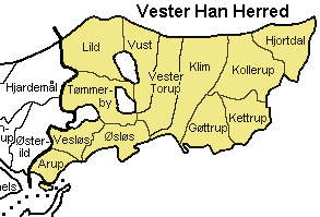 Vester Han Herred, Thisted Amt Denmark Source: Map by Svend-Erik Christiansen